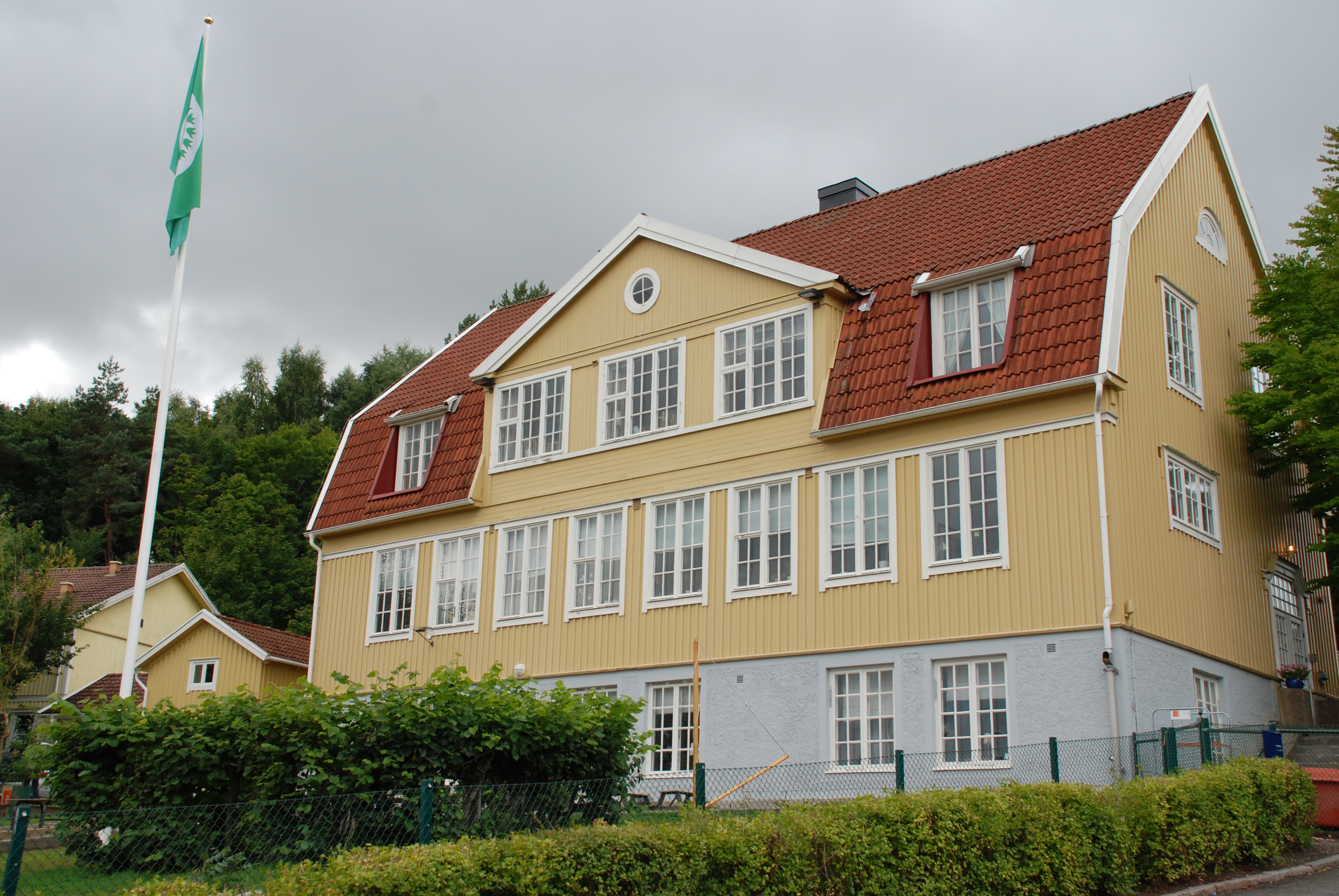 Holtermanska barnhemmet vid Norra Holtermansgatan/Rundbergsgatan i stadsdelen Åby i Mölndal. Byggnaden uppförd 1916.